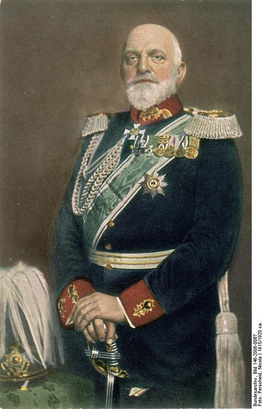 Generaloberst von Heeringen Friedrich O. Wolter, Kunstverlag Berlin W35 Originalaufnahme Hofphot. [Nicola] Perscheid [?]